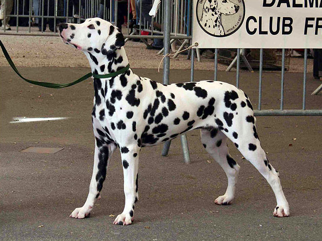 Bel Esprit de Puech barrayre (expo). Dalmatiner.